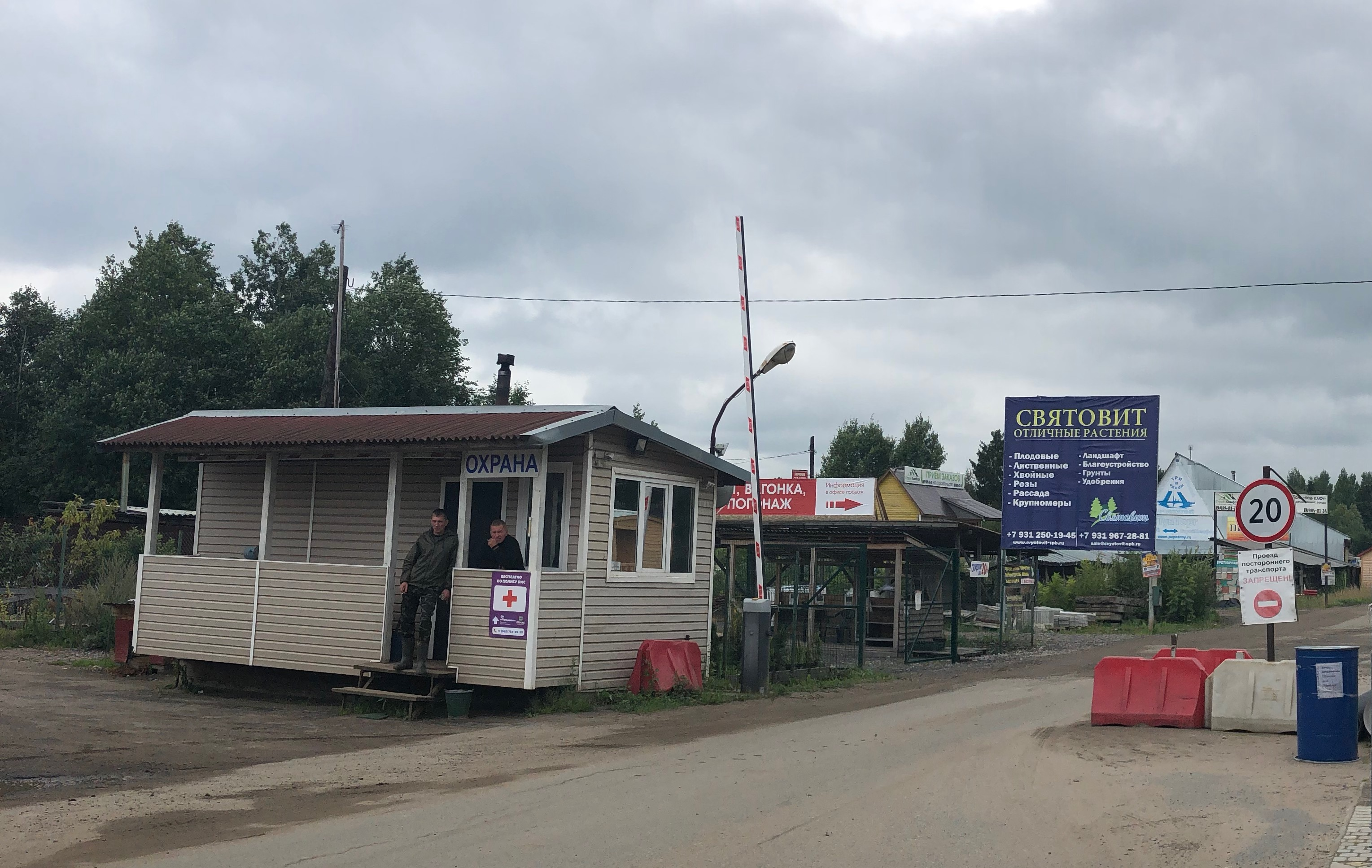 Въезд в массив Пупышево